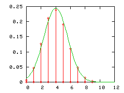 diagramme d'une loi binomiale de paramètres 12 , 1/3 et gaussienne associée. Image personnelle créée avec Gnuplot. Domaine public